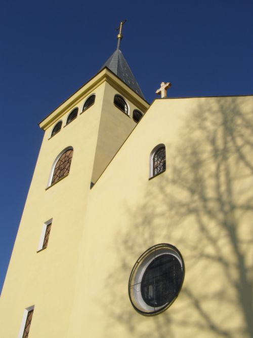 Fotografie věže kostela na Křížovém vrchu po rekonstrukci.